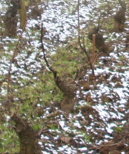 Pieds de vigne en taille Guyot (à Meursault)